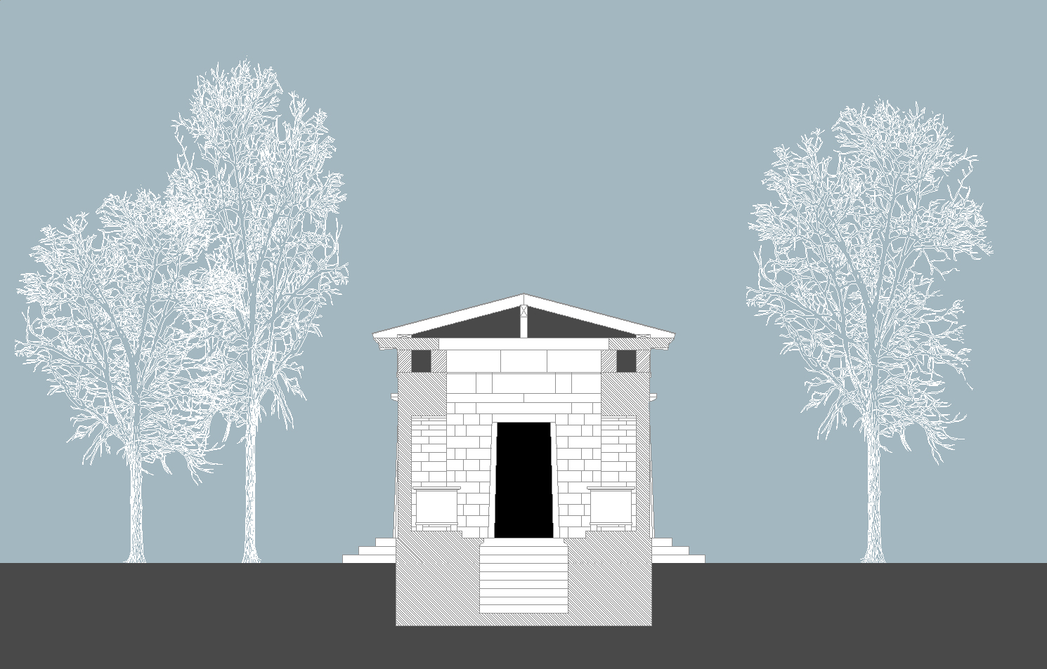 Mausoleum der Familie von Hoym, Schnitt A. © Eiko Behrens